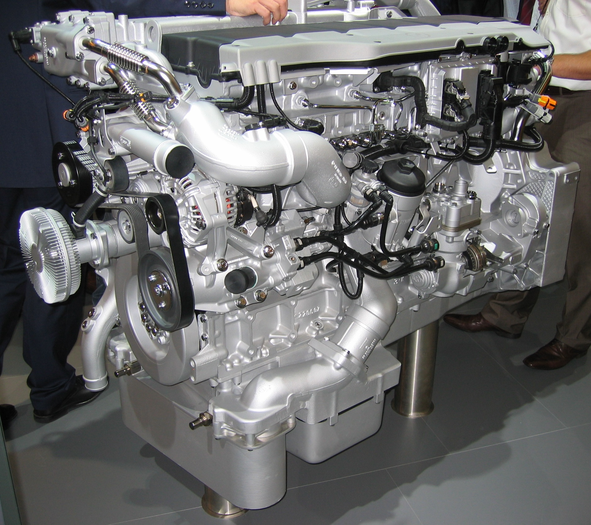 R6-Dieselmotor von MAN (Typ D2676LFxx)